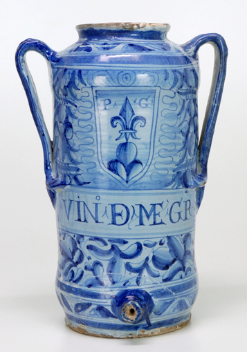 Albarello da farmacia a decoro "berrettino" centrato da stemma. Venezia XVII secolo